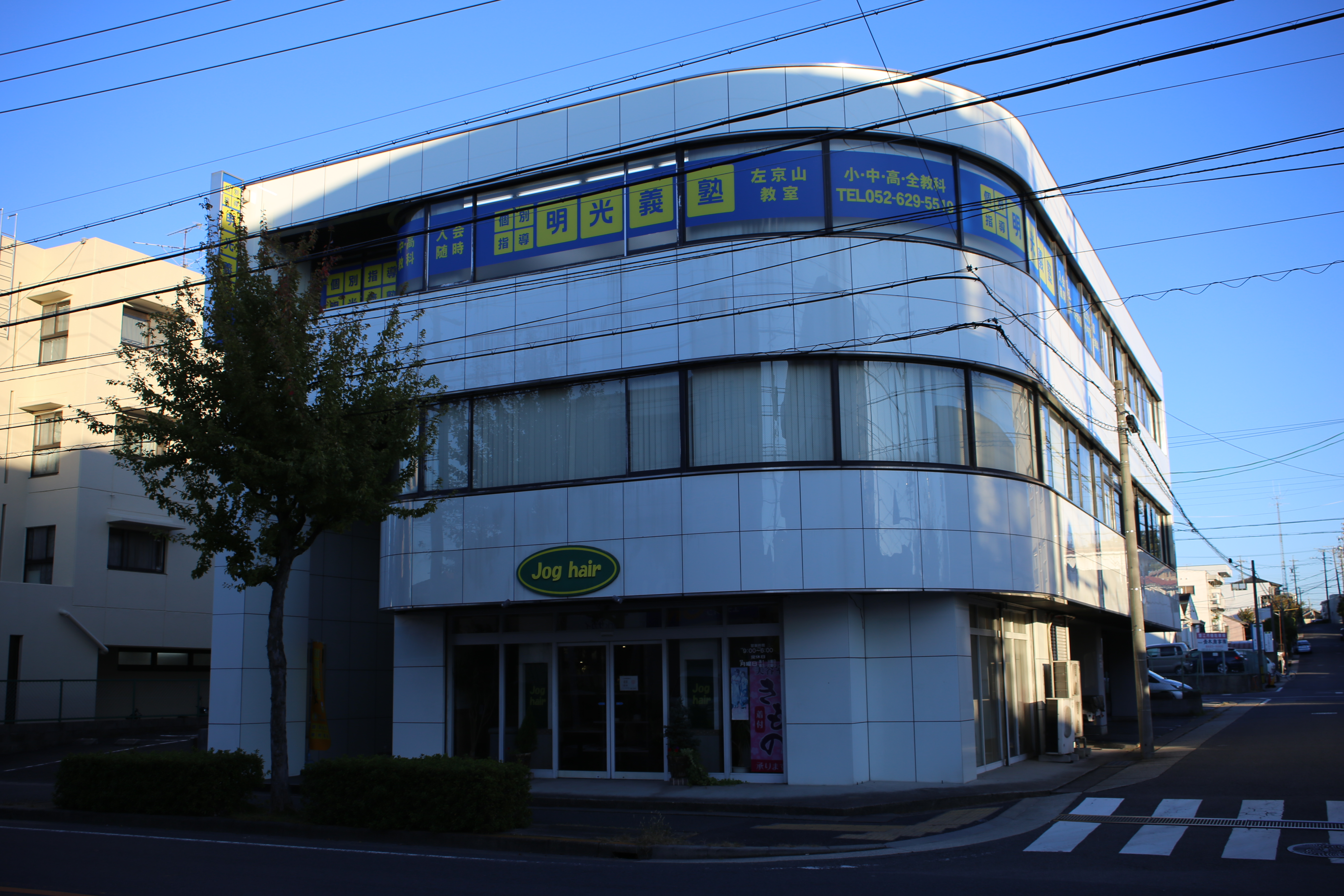 名古屋市緑区曽根二丁目のサイエンスビルを西側公道南側より撮影